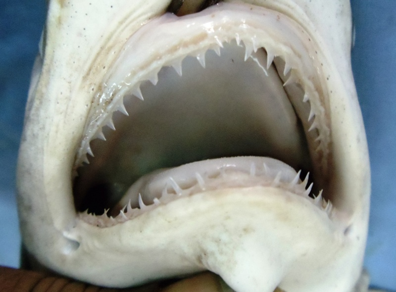 Carcharhinus macloti jaws Karachi